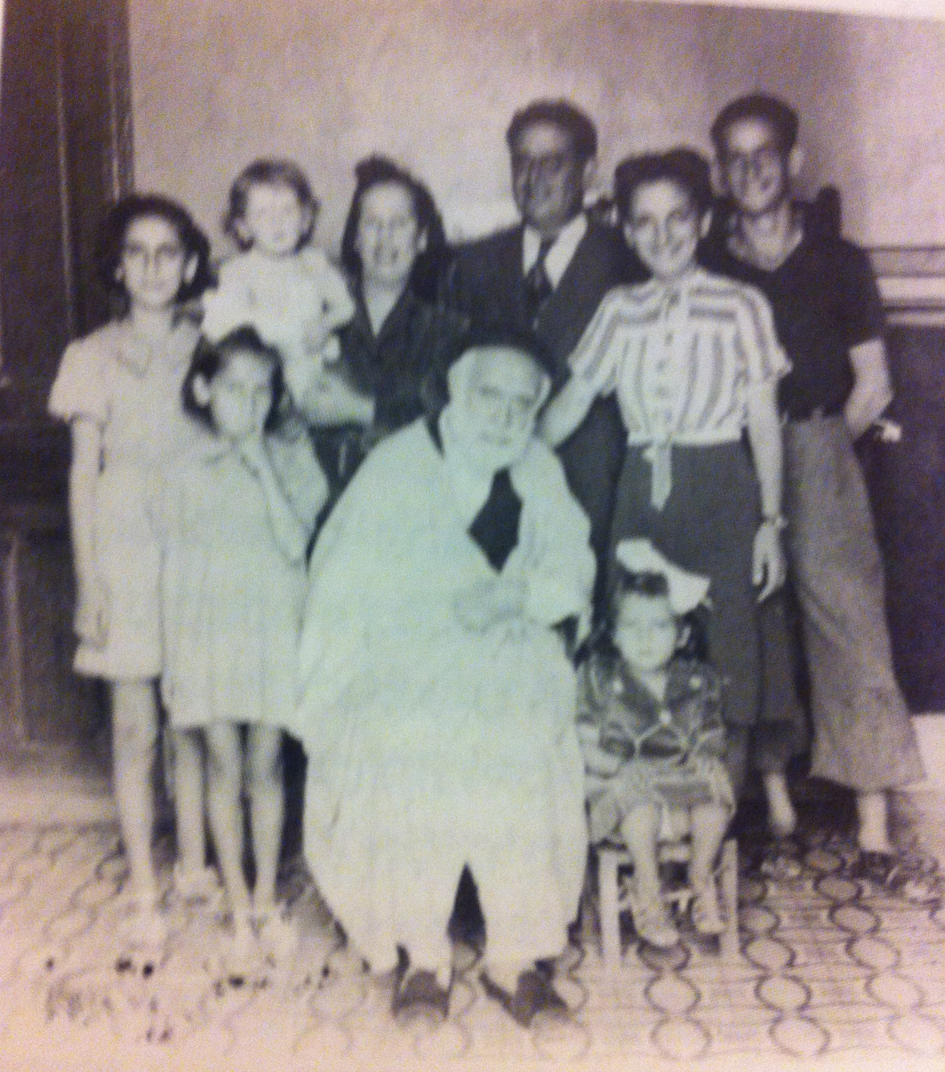 Jewish-Tunisian writer and journalist Messod Maarek with the family of his son, the journalist Henri Maarek.1930's